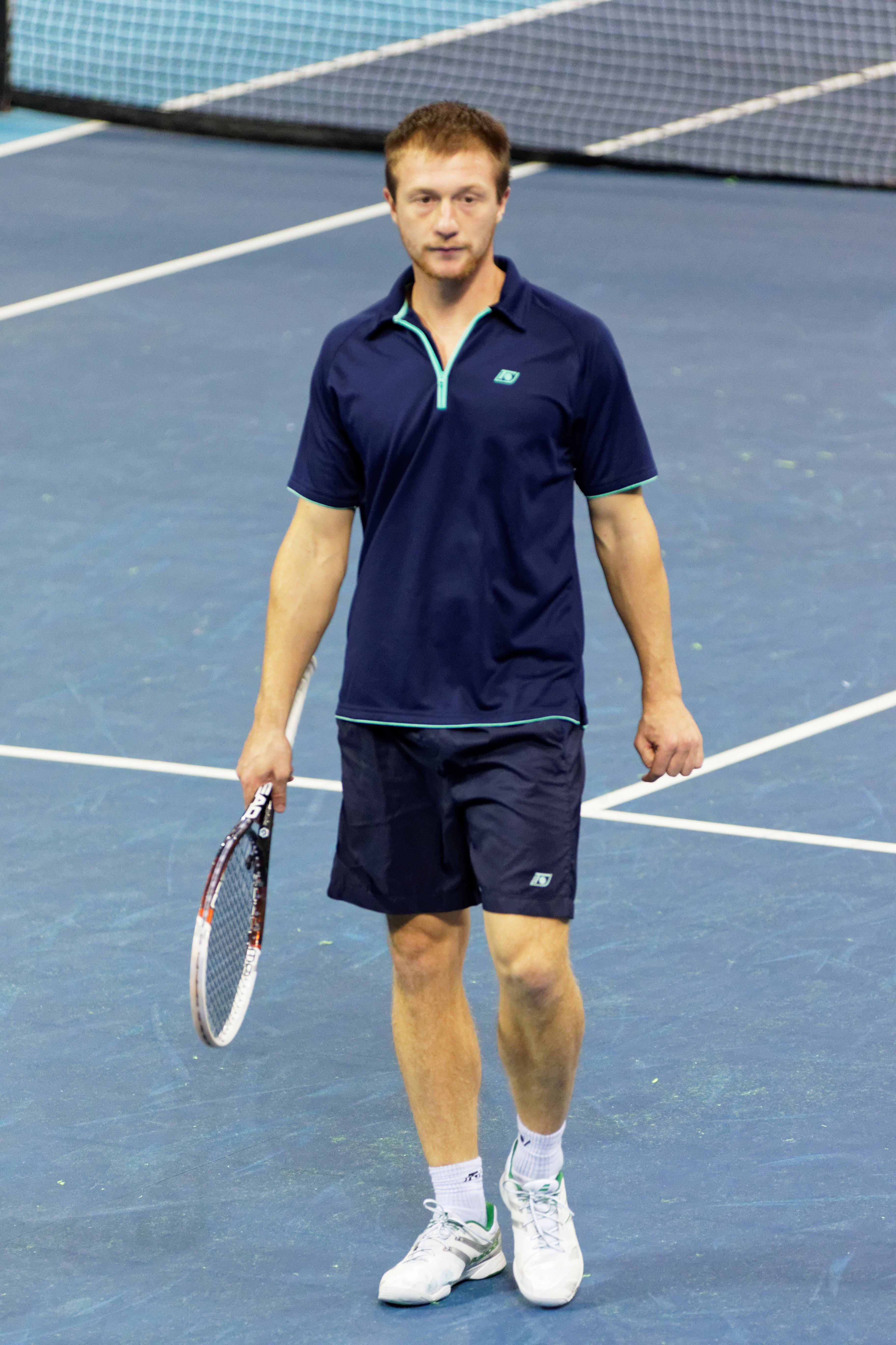 Rencontre entre Sadio Doumbia - Maxime Tabatruong et Ilija Bozoljac - Antonio Sancic lors du huitième de final de l'Open de Brest Arena 2015.Ilija Bozoljac et Antonio Sancic gagneront en deux sets.